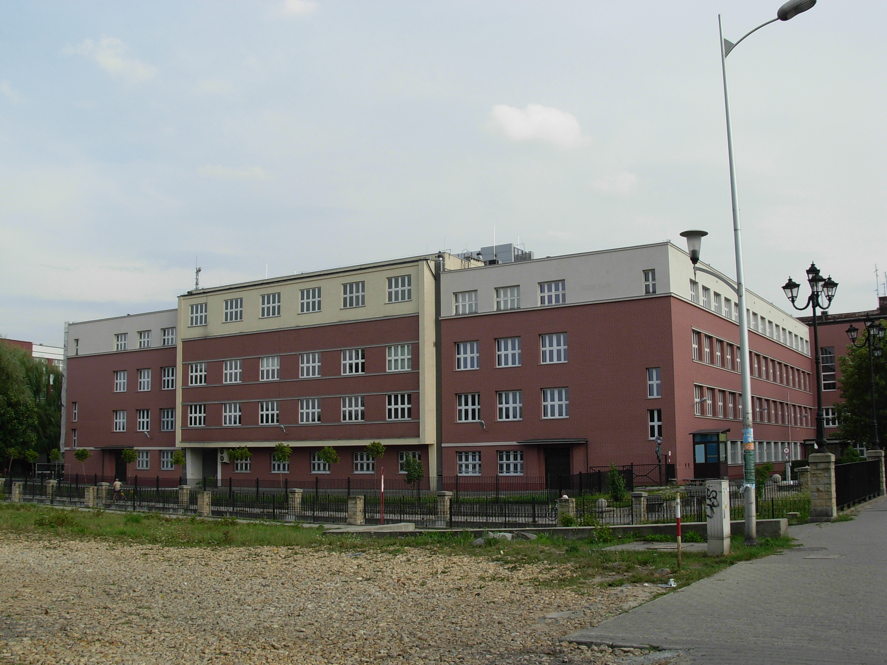 Katowice